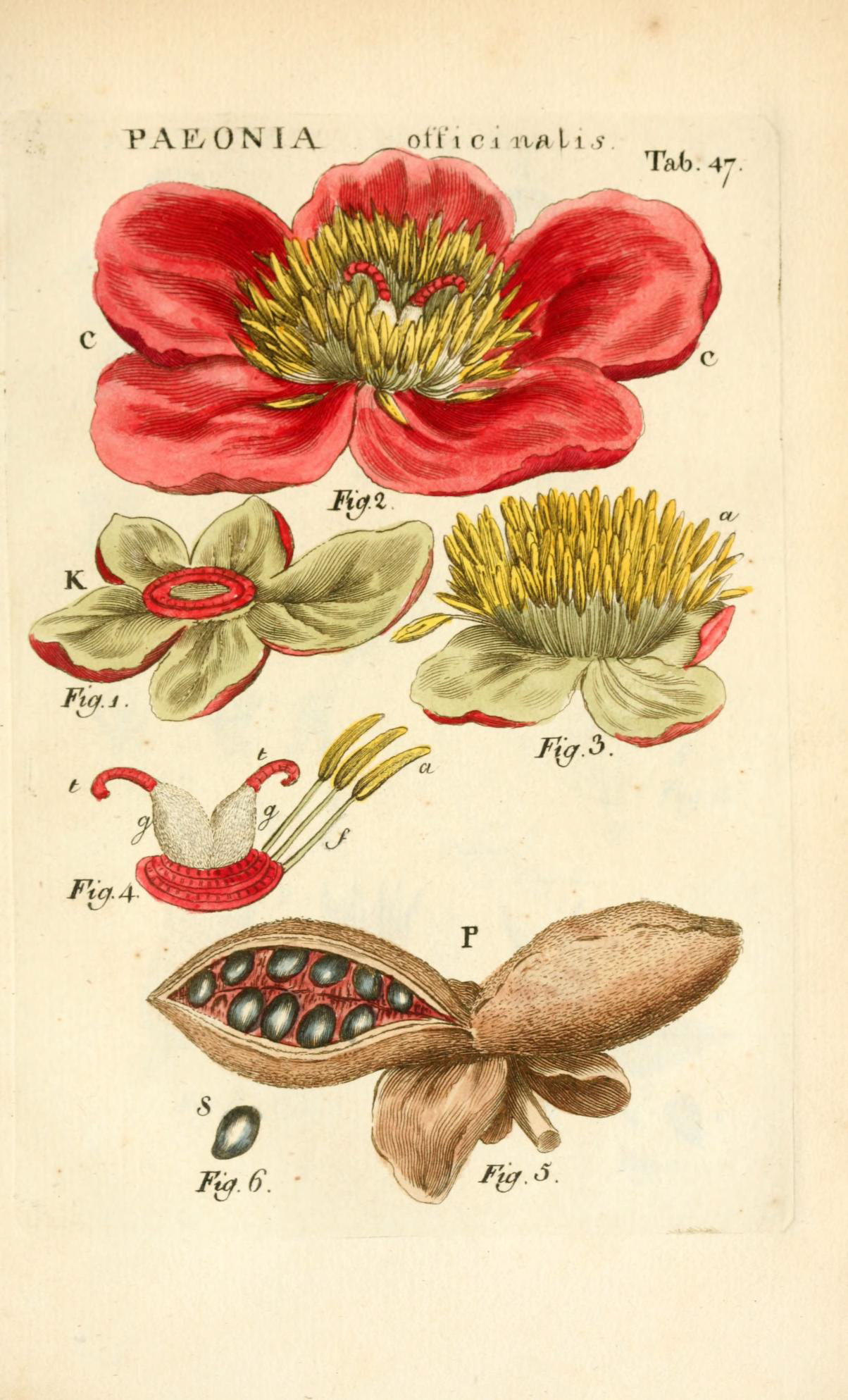 PAE.0N1A f^l I I I' I nH I 1 .•